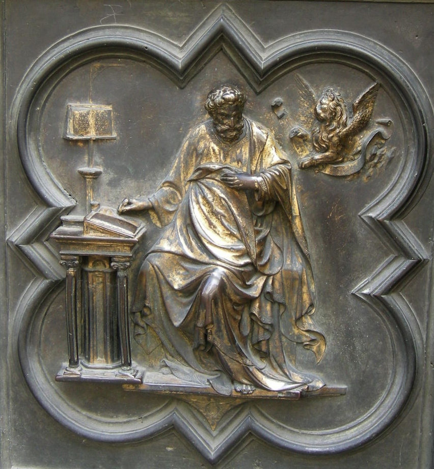 4 san marco4